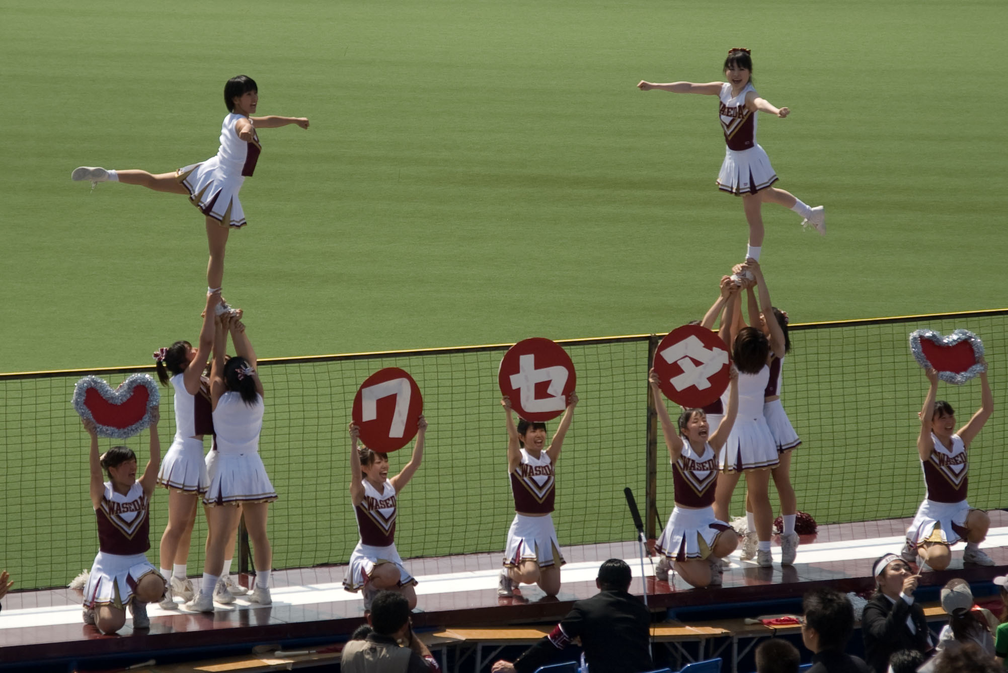 Ōendan